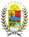 Escudo del municipio Bolívar, estado Barinas, Venezuela